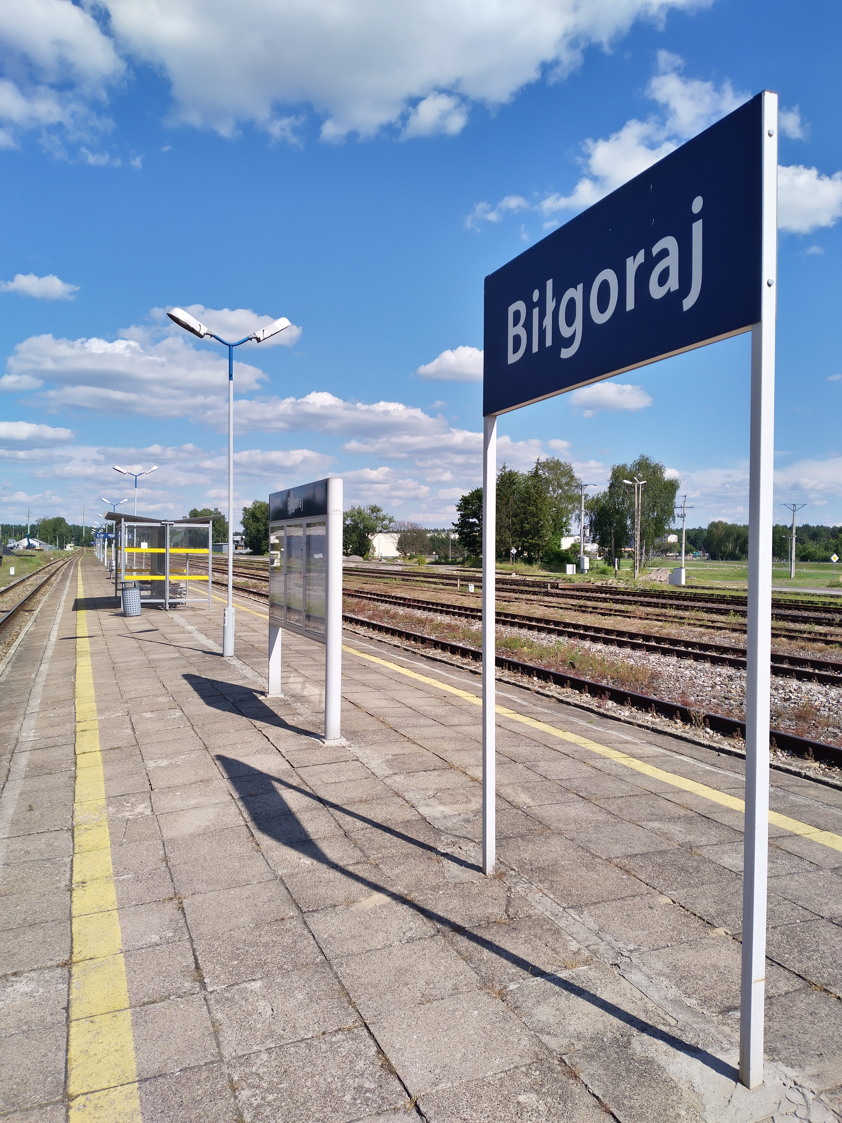 Peron 1 na stacji kolejowej Biłgoraj.